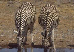 Burchell's Zebra